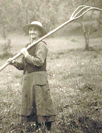 Vieille paysanne d'Entraunes faisant les foins